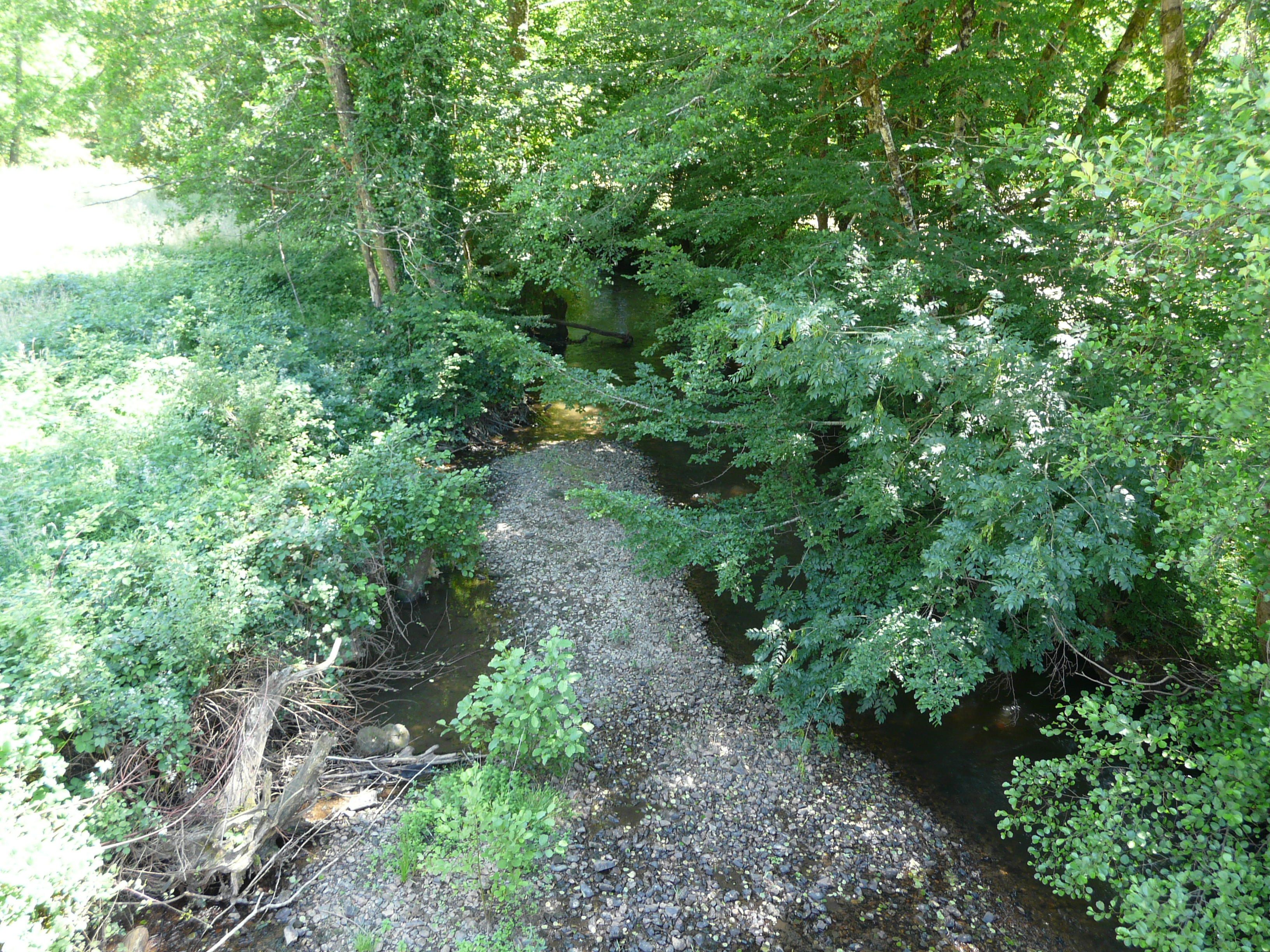 La Souvigne à Saint-Chamant, Corrèze, France. Vue prise en direction de l'aval.